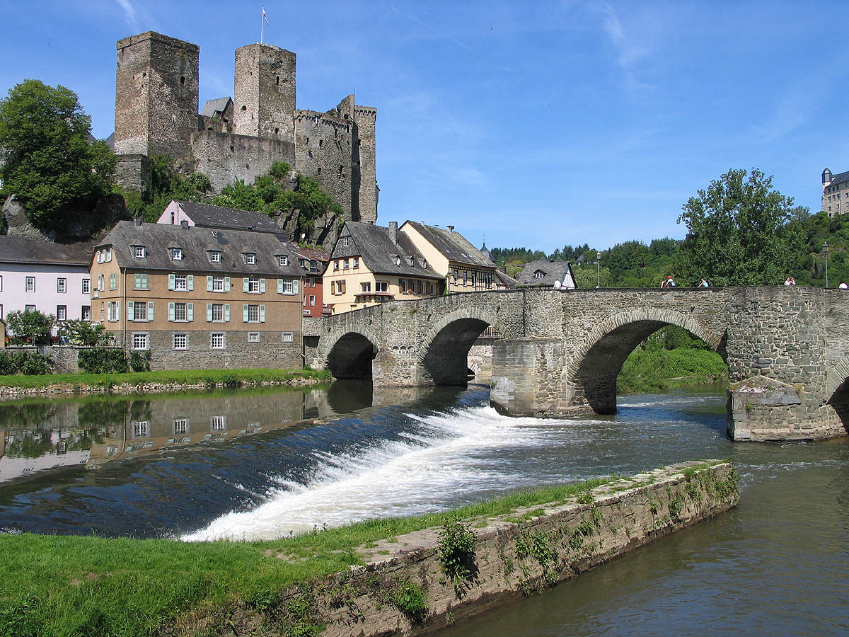 Burg Runkel, Runkel, Lahn, Deutschland